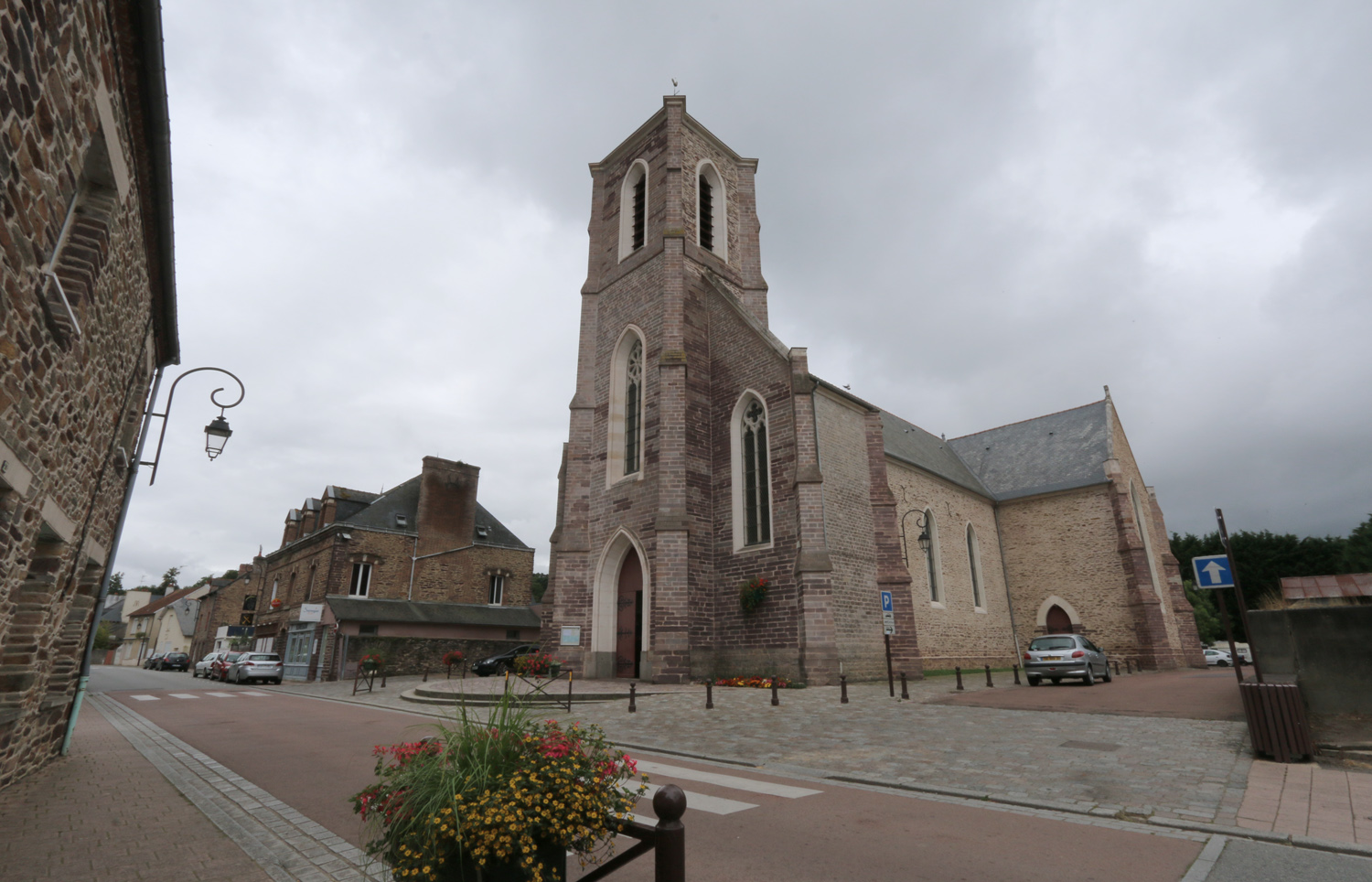 Eglise de Pont-Réan